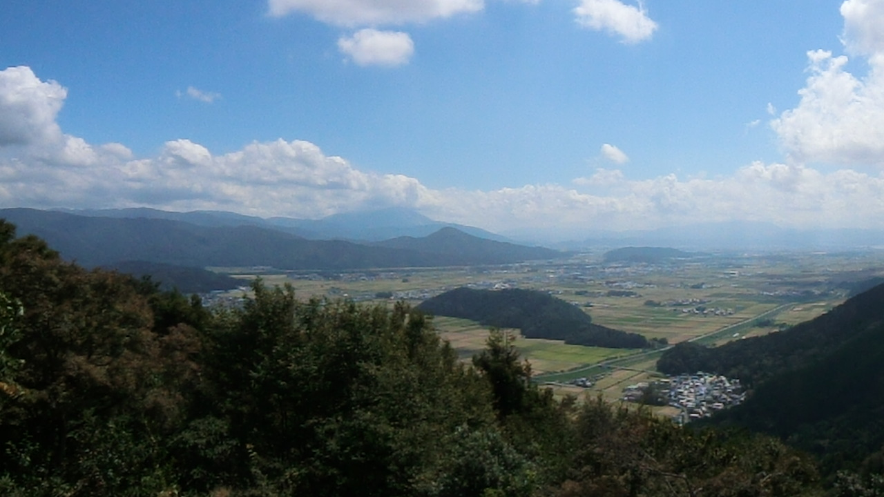 賤ヶ岳頂上で撮った風景。滋賀県長浜市高月町周辺